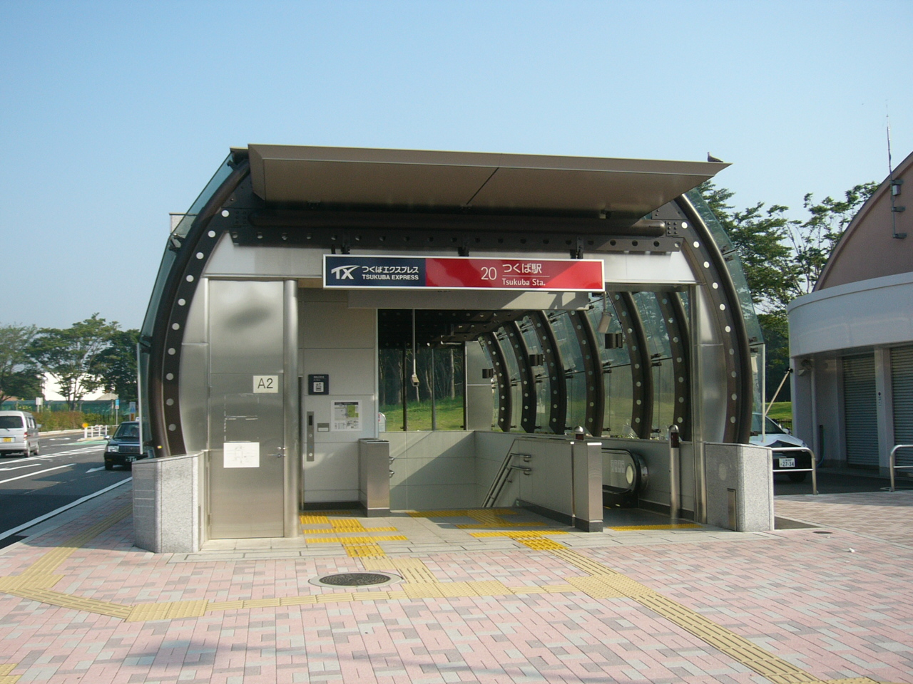 Tsukuba Station (A2 Exit)